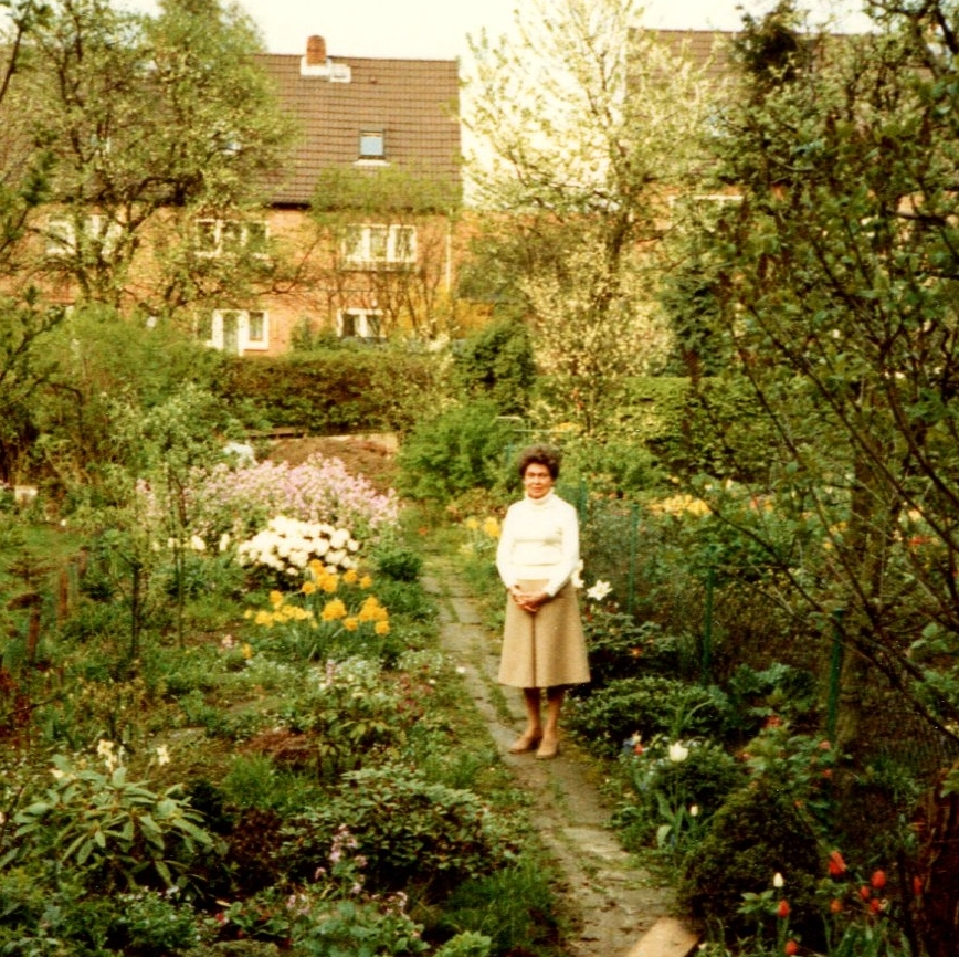 Garten des denkmalgeschützten Reihenhauses Kornweg 17E in Hamburg Klein Borstel. Hinter der Hecke verläuft ein Düngeweg, dahinter die Häuser Am Stein.